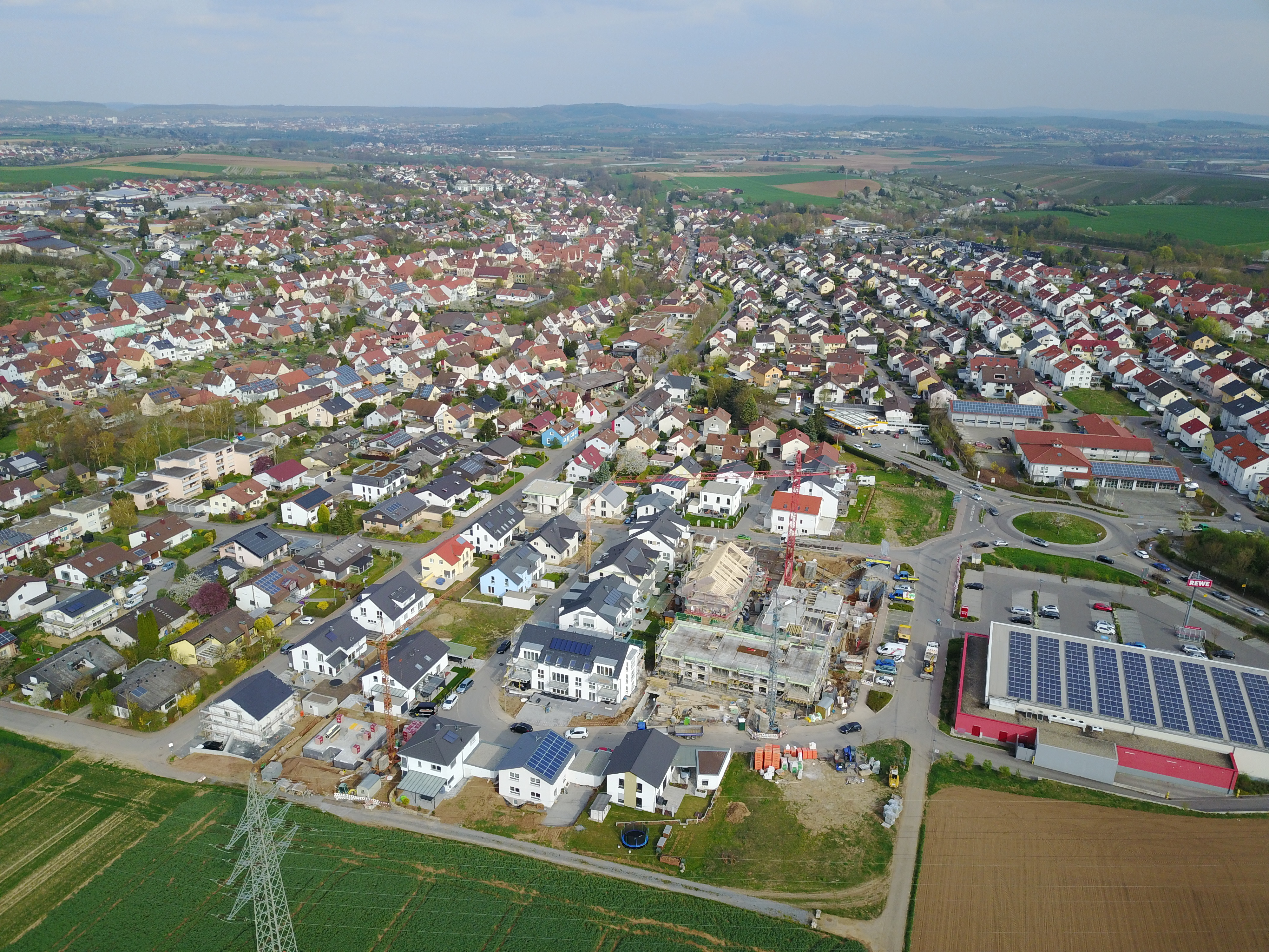 Im Bild kann man vom Feld aus einen Blick auf Nordheims Zimmerer Höhe werfen.